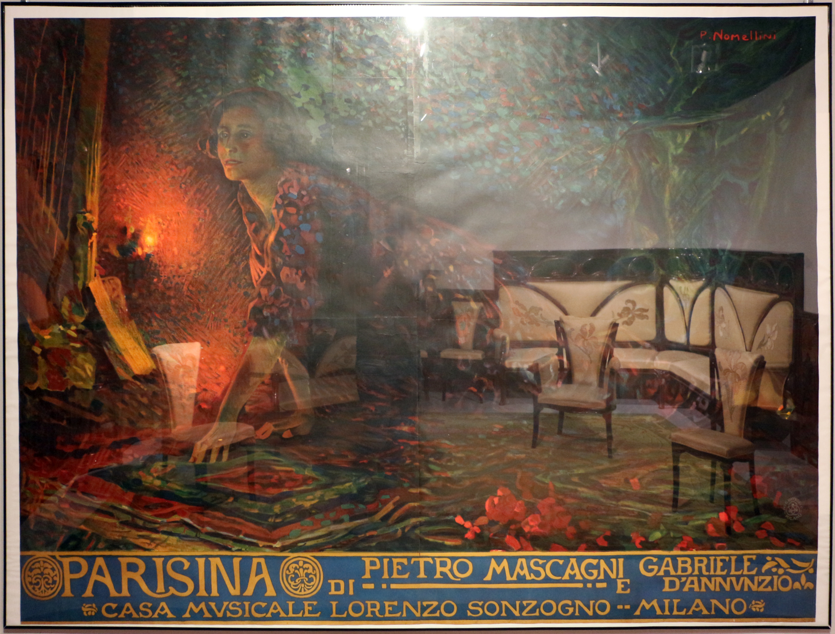 Il parco e i musei di Nervi This is a photo of a monument which is part of cultural heritage of Italy.